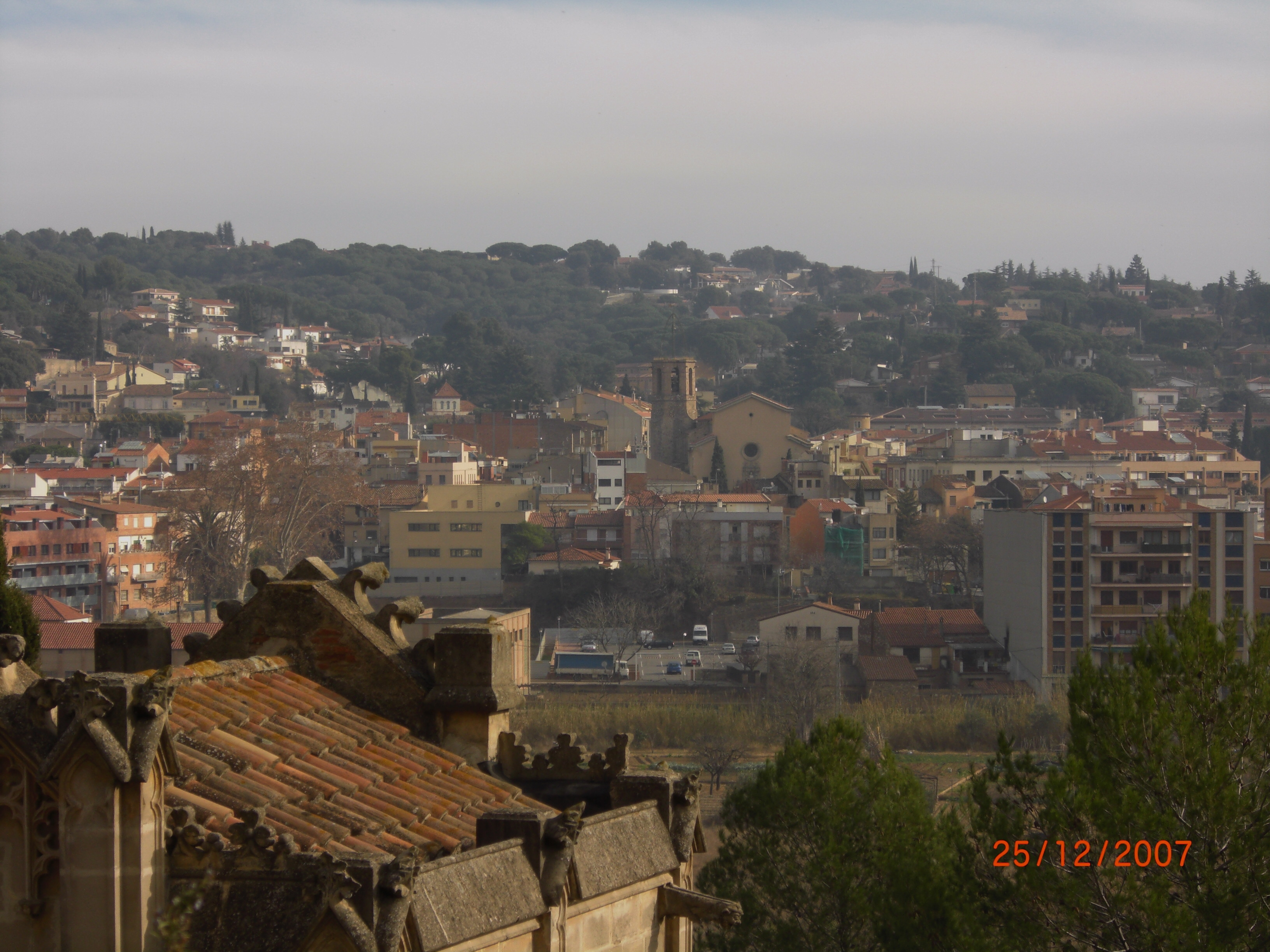 La Garriga des de la Doma el dia de Sant Esteve